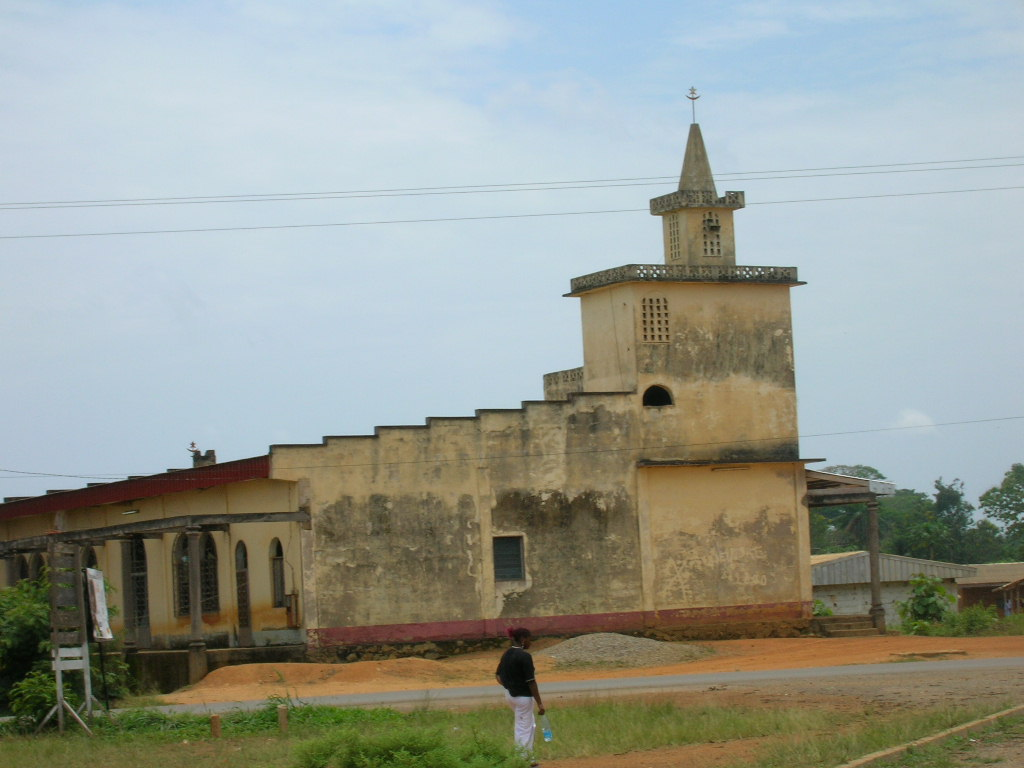 La mosquée de Bafia qui est une ville qui se situe en Afrique centrale au Cameroun, dans la province du Mbam et Inoubou à 120 km de Yaoundé la capitale